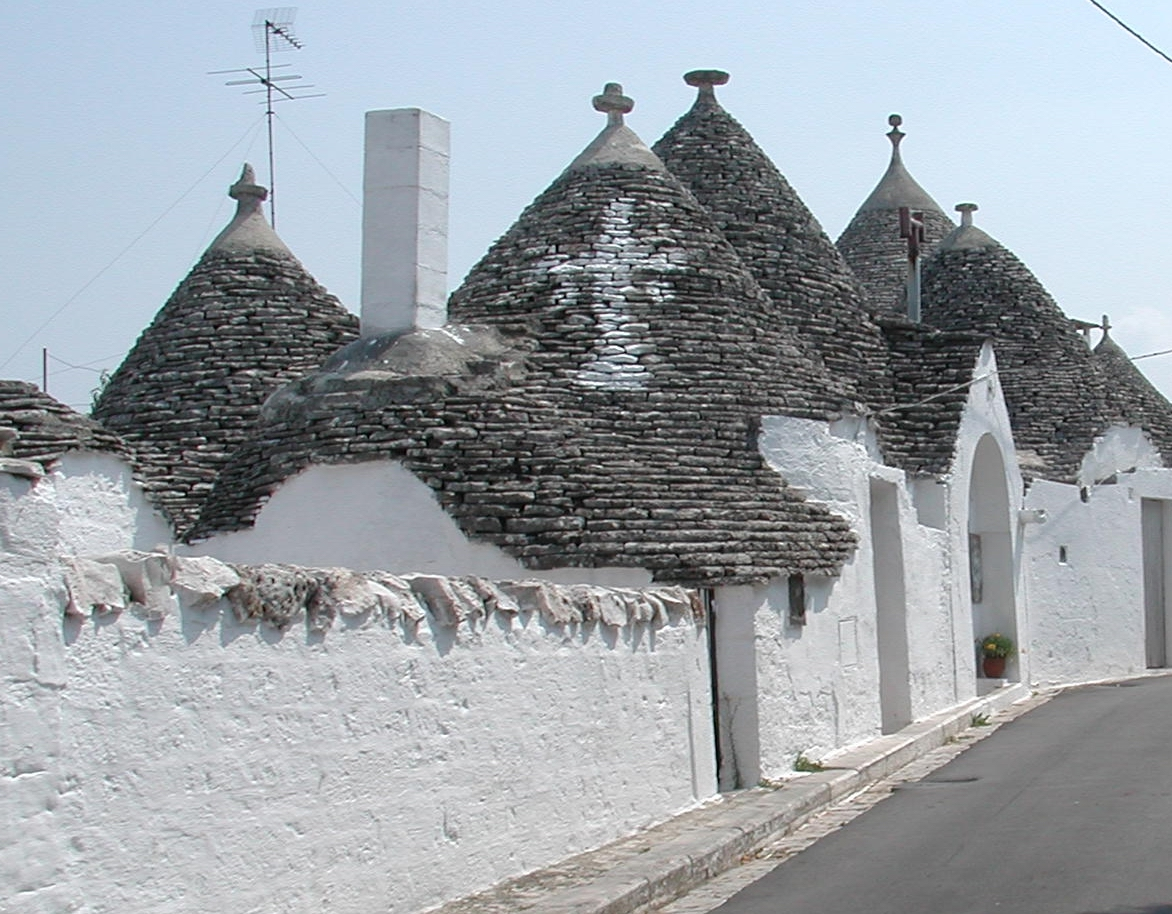 Alberobello, Puglia, Italia Trulli foto:Paolo da Reggio 2003